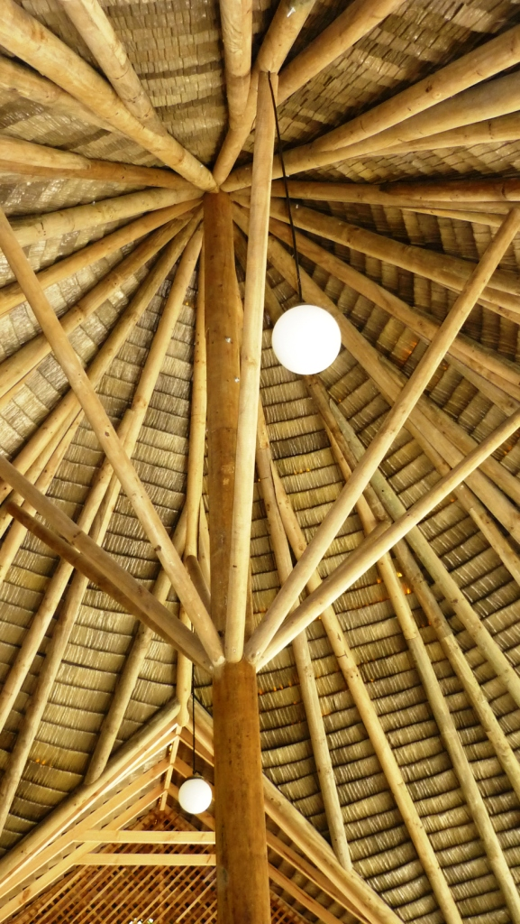 Nuevas obras en Guayabo inspiradas en sistemas constructivos ancestrales, bajo la dirección técnica del Arq. Ibo Bonilla